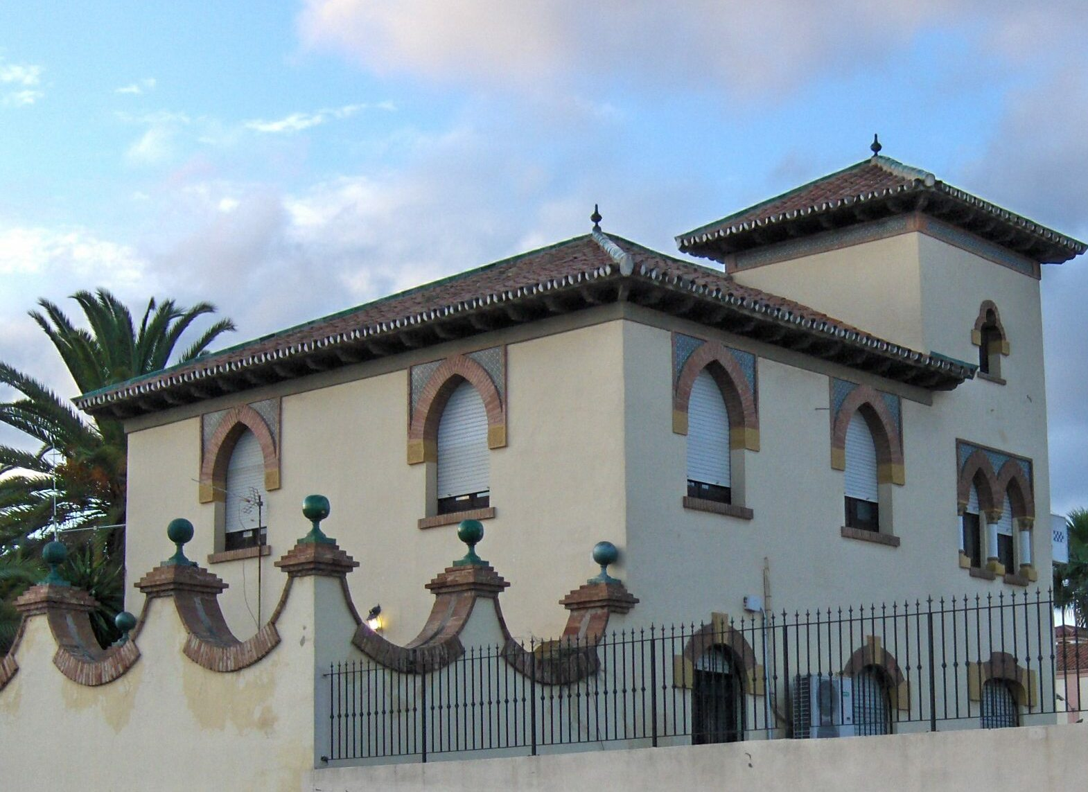 Antiguo matadero de Cruz de Humilladero, Málaga, España. Obra de Fernando Guerrero Strachan